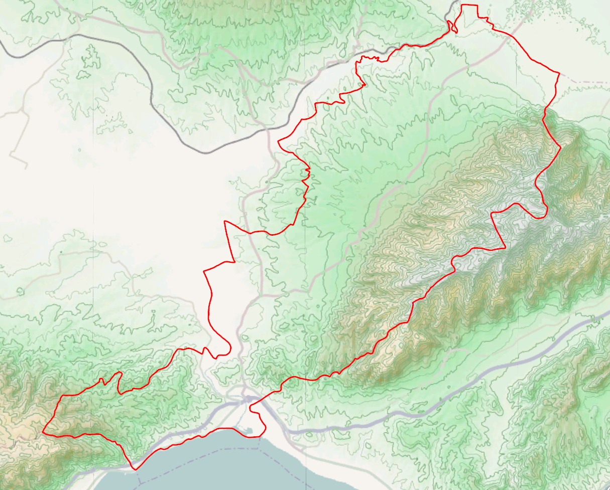 Τοπογραφικός χάρτης του Δήμου Αμφίπολης